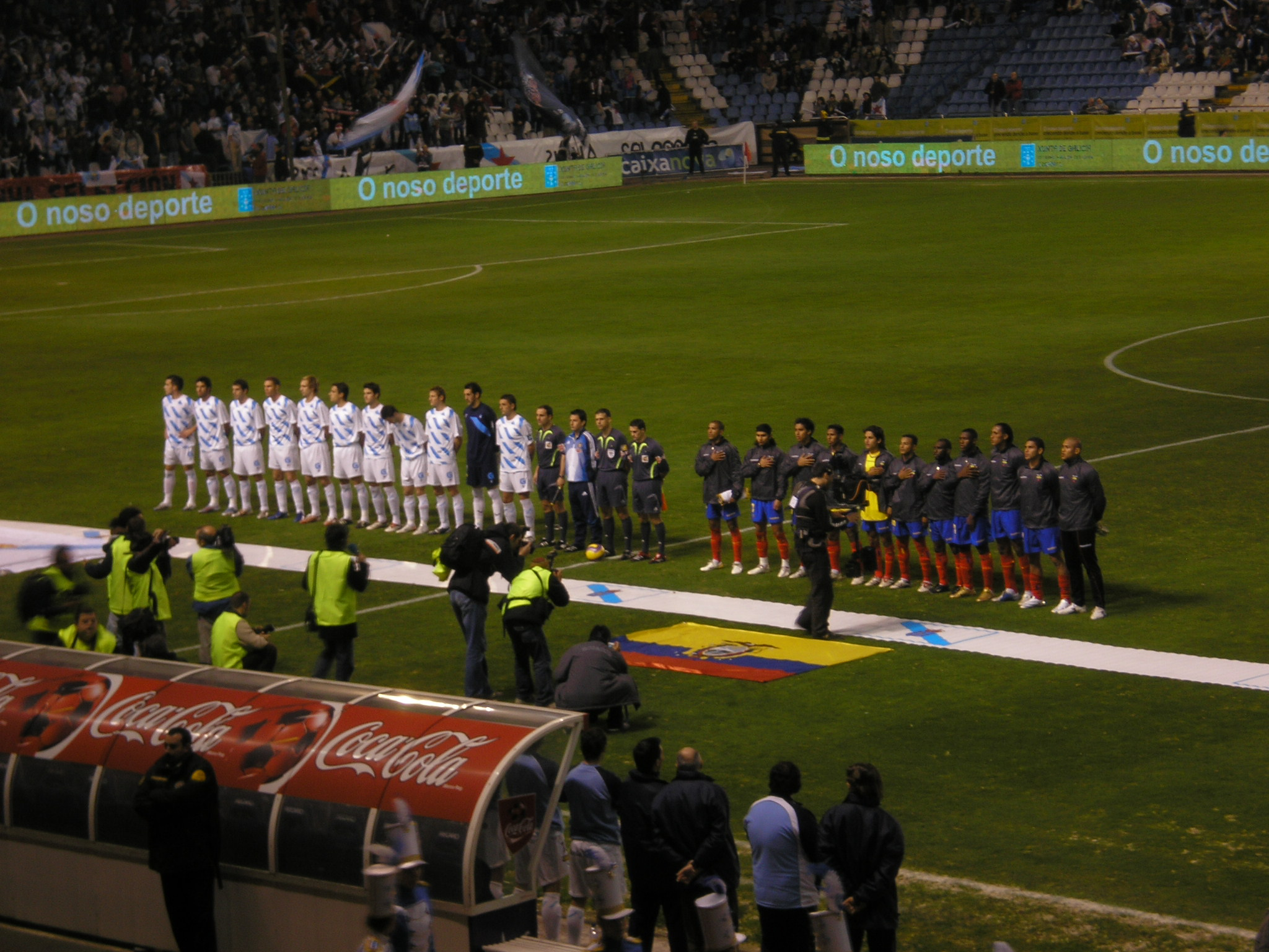 Partido entre as seleccións de fútbol de Galicia e Ecuador.